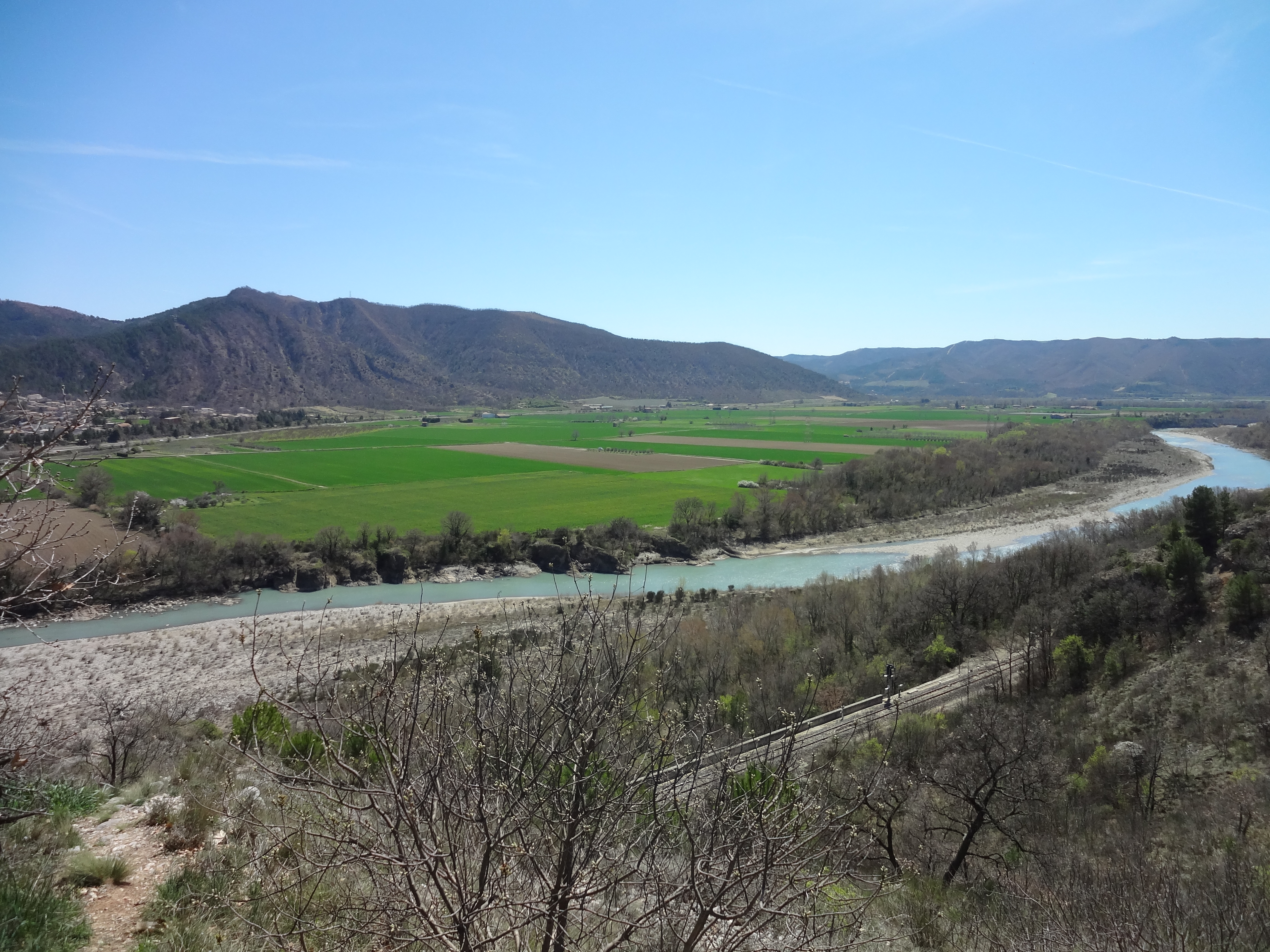 lit de la Durance converti en cultures après la mise en eau du barrage de l'Escale. Au fond, les collines qui séparent Malijai de l’Escale : Saint-Pierre (821 m) et La Pourrachère (861 m). Encore plus à droite (au sud), le plateau de Valensole